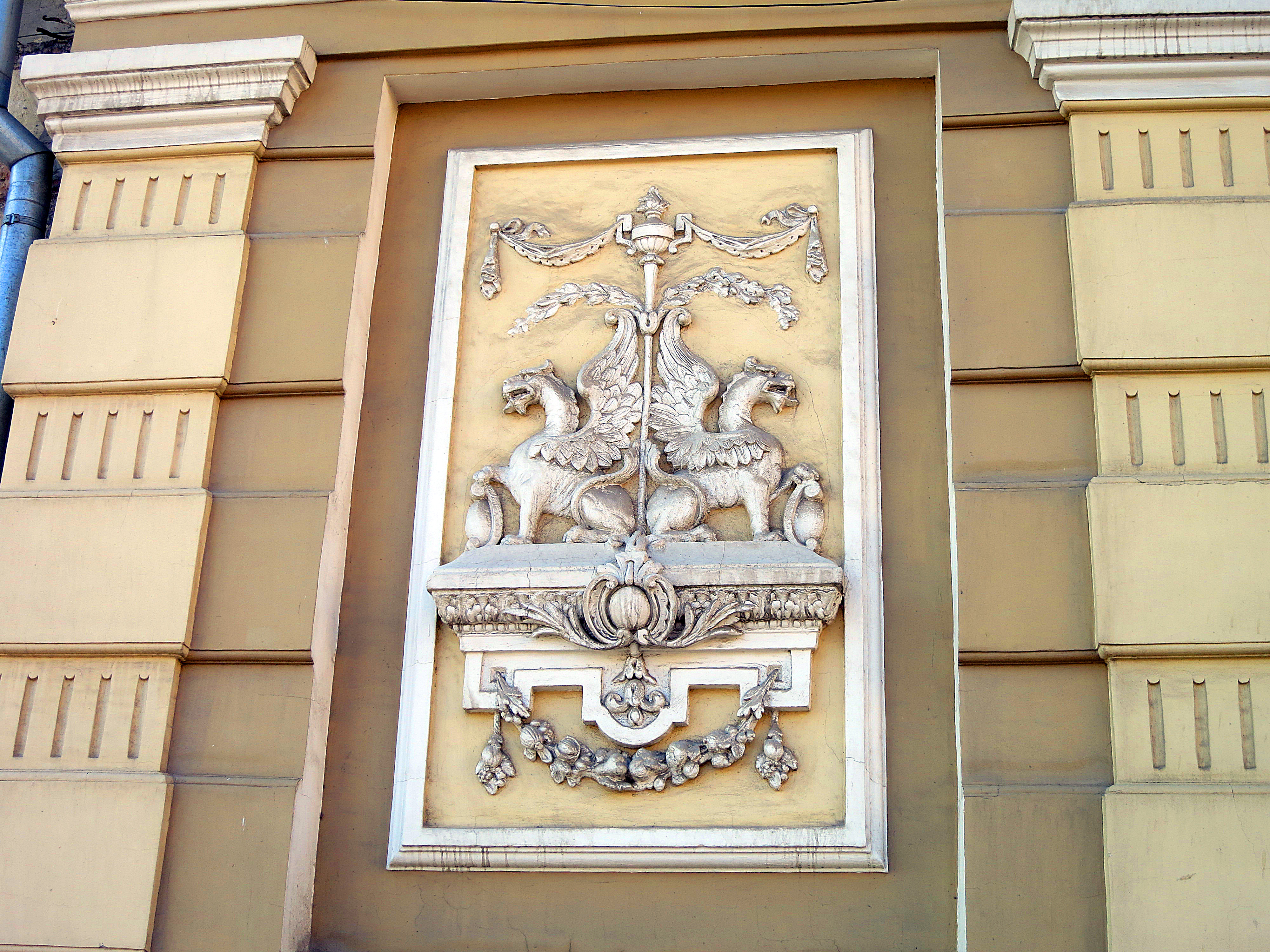 Доходный дом Л.Ф. Волкенштейн: улица Станиславского, 104/25, переулок Газетный, литер А, Ростов-на-Дону, Ростовская область